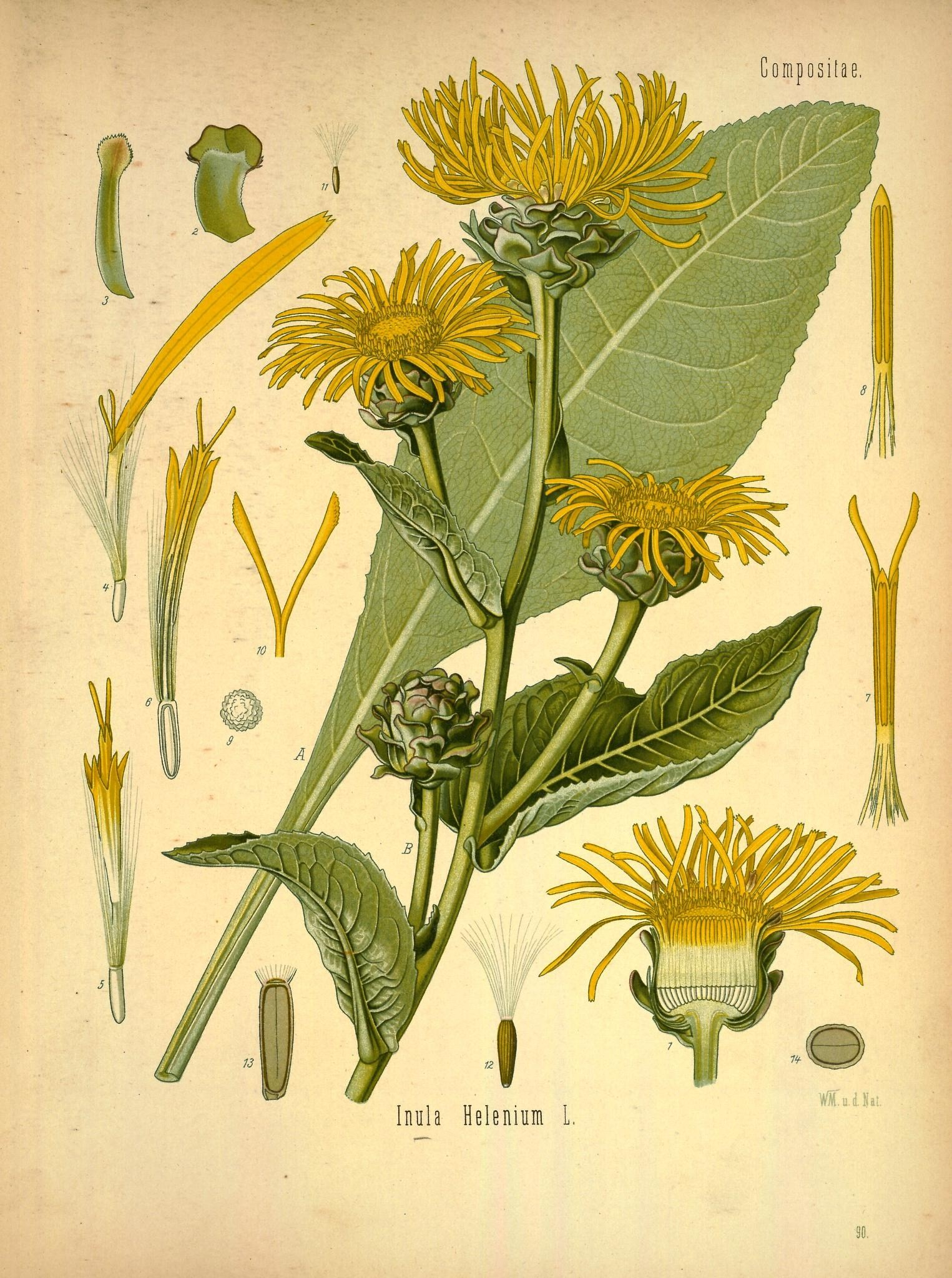 Echter Alant. A Wurzelblatt, kleines Exemplar, natürl. Grösse; B oberer Theil der blühenden Pflanze, desgl.; 1 Blüthenkorb im Längsschnitt, desgl.; 2 und 3 äusseres und inneres Hüllkelchblatt, etwas vergrössert; 4 Randblüthe, vergrössert; 5 Scheibenblüthe, desgl.; 6 letztere im Längsschnitt, desgl.; 7 Staubgefässröhre mit hervorstehenden Narben, desgl.; 8 einzelnes Staubgefäss, desgl.; 9 Pollen, desgl.; 10 Narben, desgl.; 11 und 12 Frucht mit Pappus, natürl. Grösse und vergrössert; 13 und 14 dieselbe im Längs- und Querschnitt.